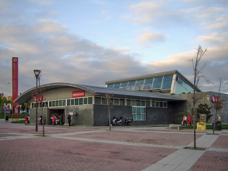 Estación de Valdelasfuentes de Cercanías Madrid. Una de las dos estaciones de cercanías de Alcobendas (Comunidad de Madrid). Estación de Valdelasfuentes de Cercanías RENFE. Alcobendas, Madrid. 6 de Noviembre de 2006